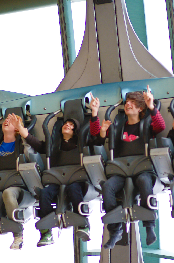 Air , montagnes russes à Alton Towers